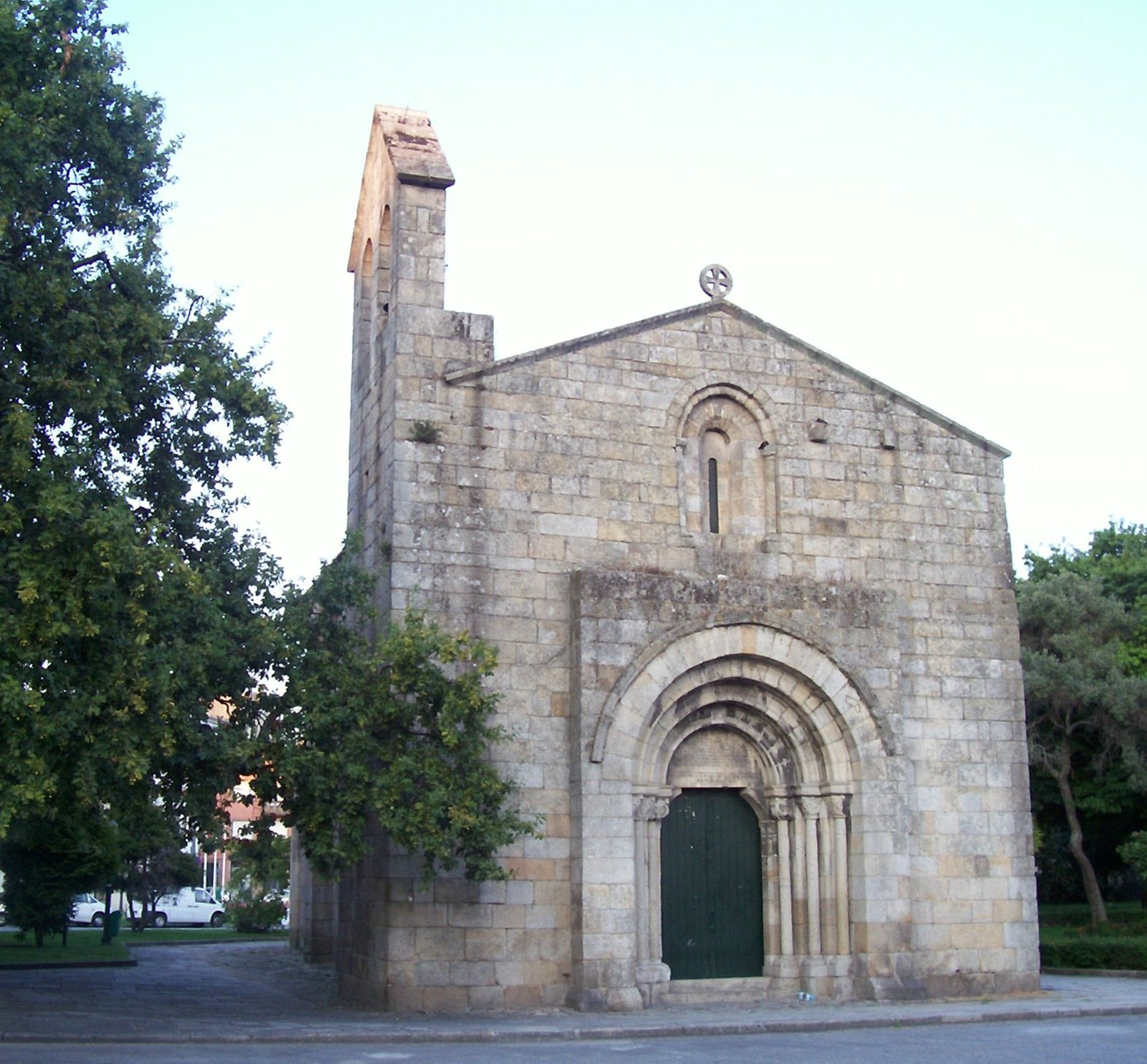 Igreja de São Martinho de Cedofeita, Cedofeita, Porto, Portugal